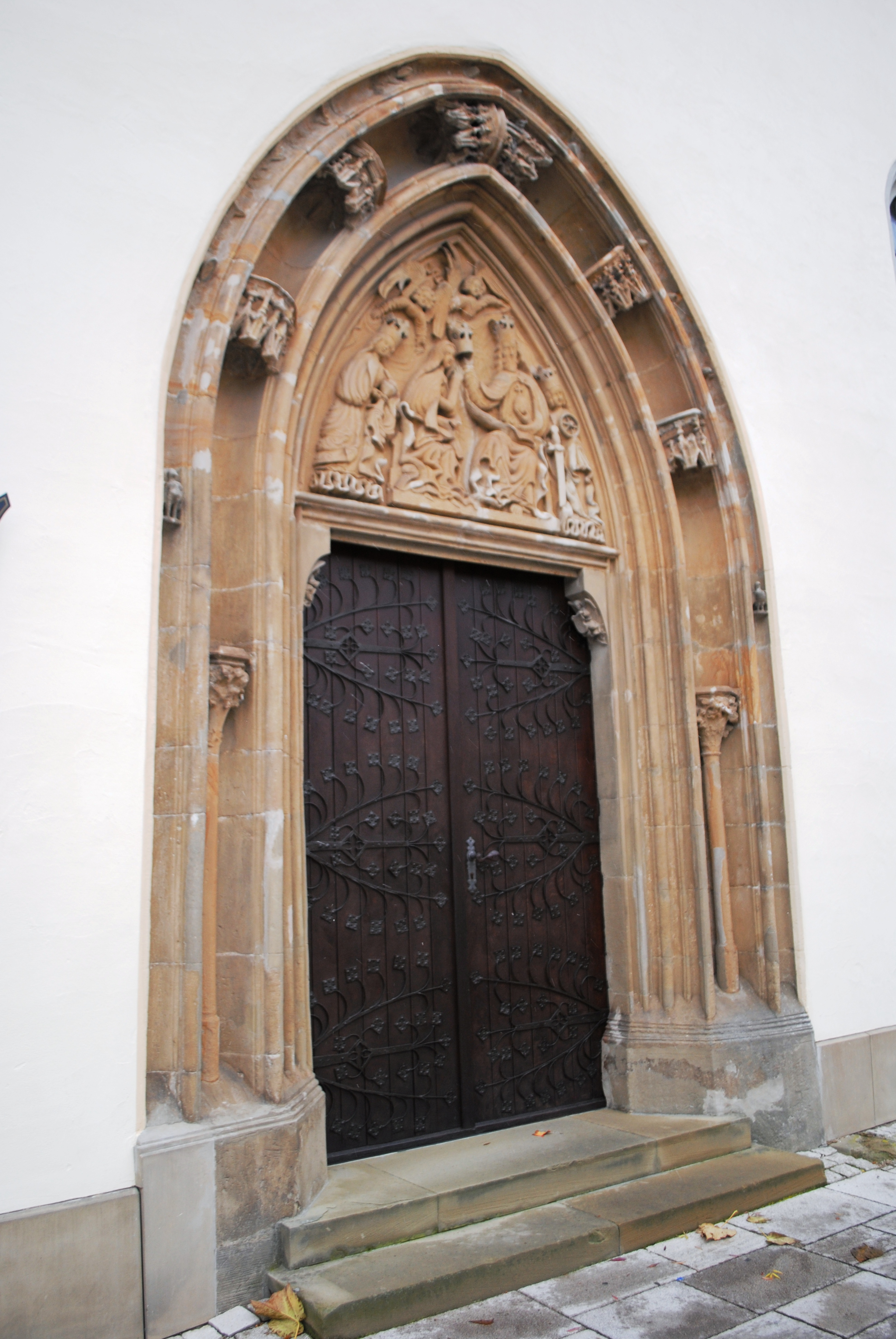 Portal, Oberer Markt 5, Volkach, an Michaeliskapelle; D-6-75-174-84